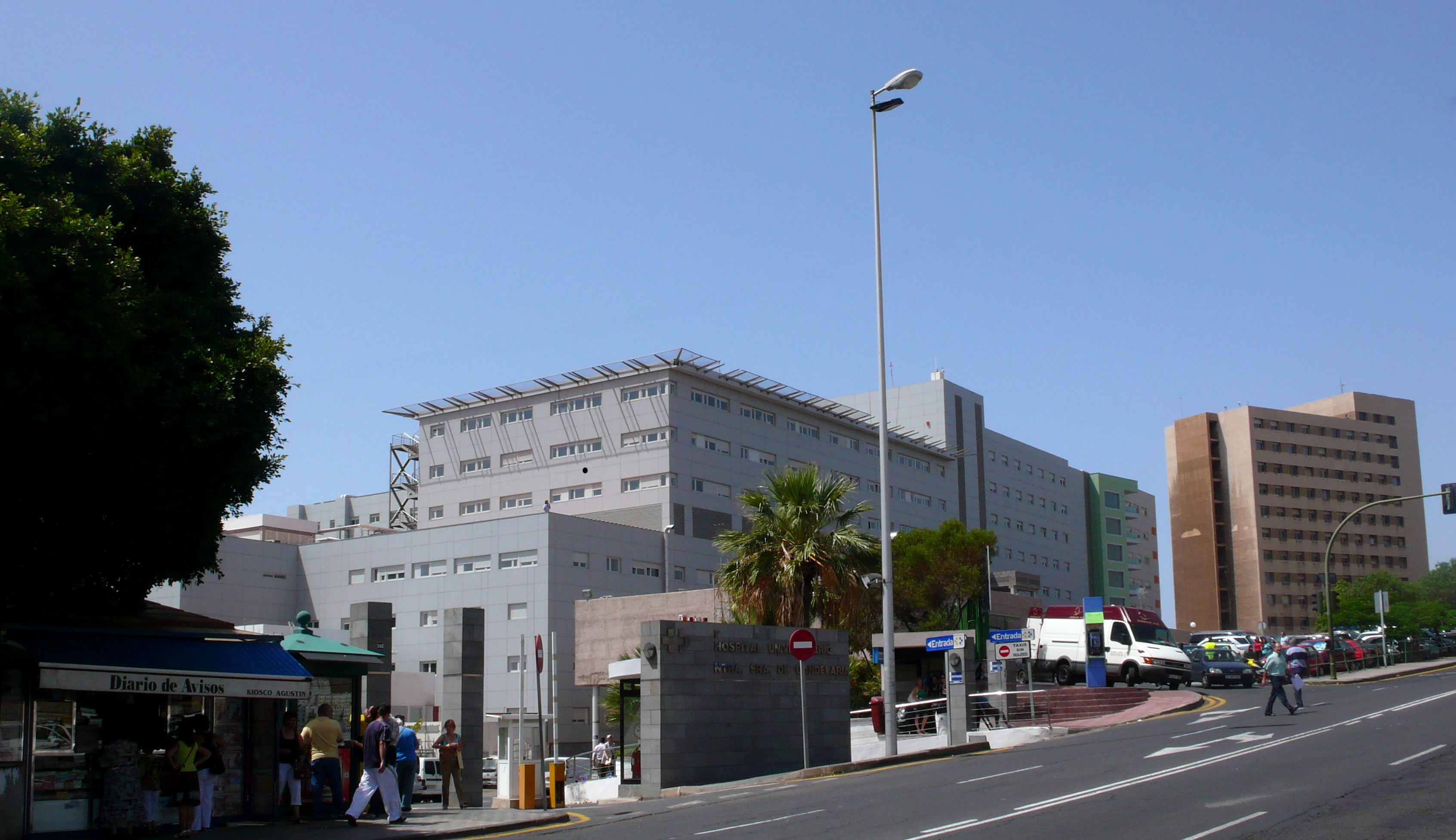 Vista del Complejo Hospitalario Nuestra Señora de La Candelaria.